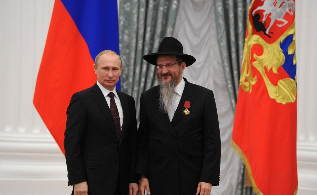 Орденом «За заслуги перед Отечеством» IV степени награждён главный раввин России Берл Лазар